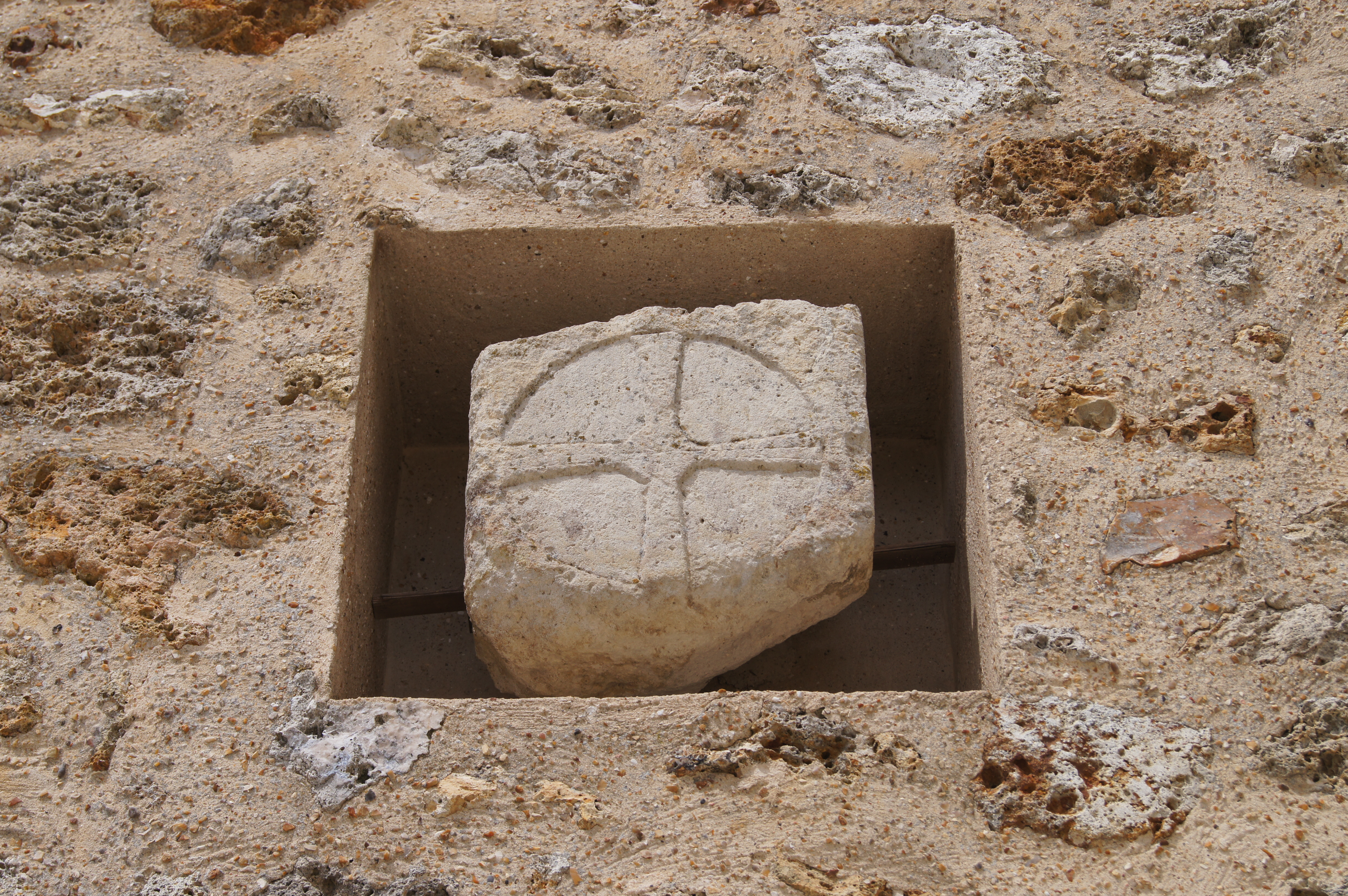 Borne templière de la Chapelle de la Commanderie de la Villedieu à Élancourt, insérée dans le mur d'un bâtiment de la commanderie, lors de la rénovation de 2012